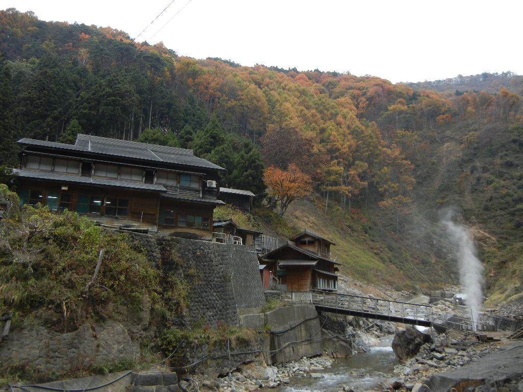 Jigokudani_Hotspring_Gorakuen. 長野県下高井郡山ノ内町の地獄谷温泉「後楽館」, Yamanouchi